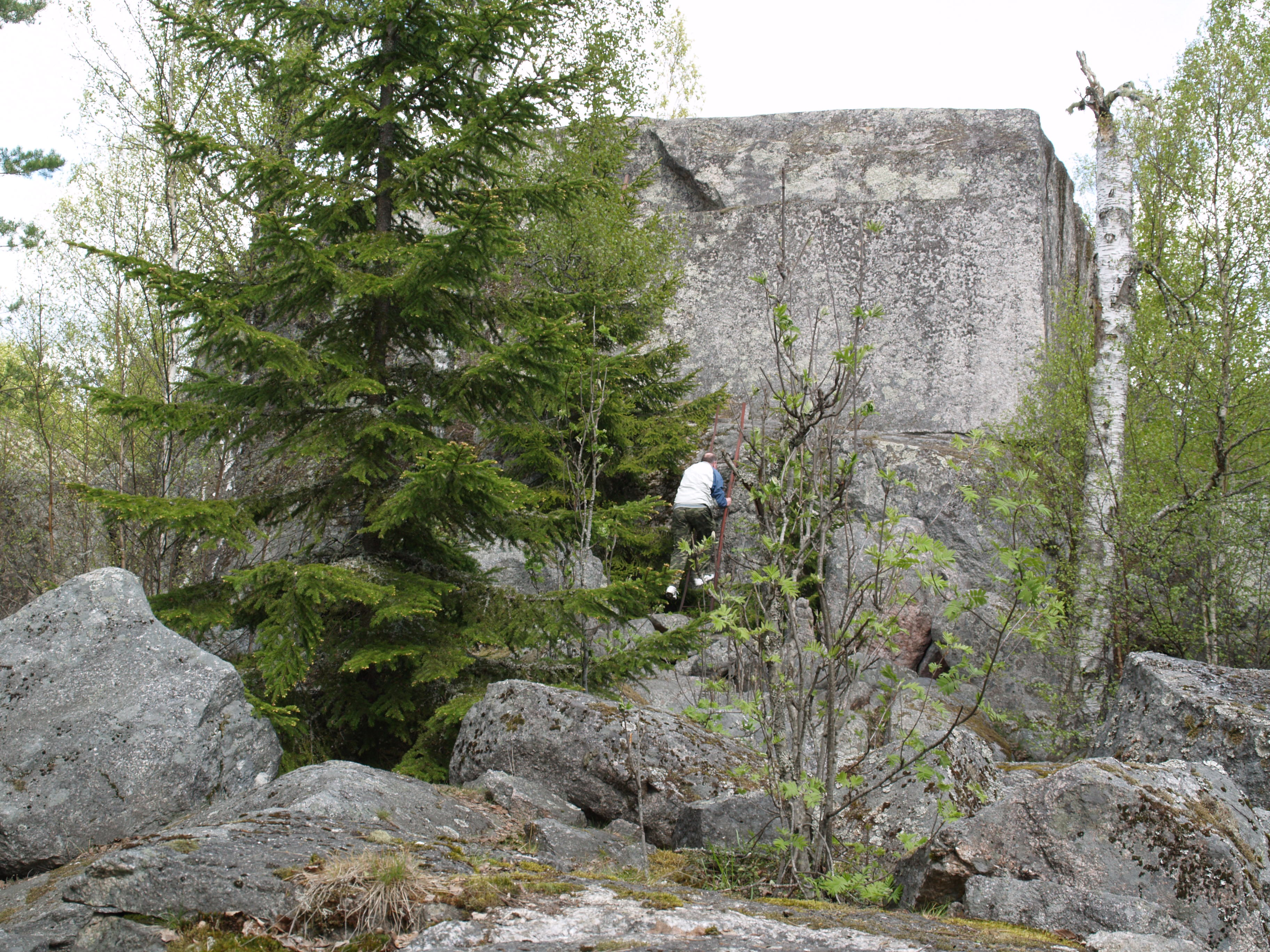 Myggstenen nära Fastarbo, 25 km nordväst om Uppsala i Uppland, Sverige.